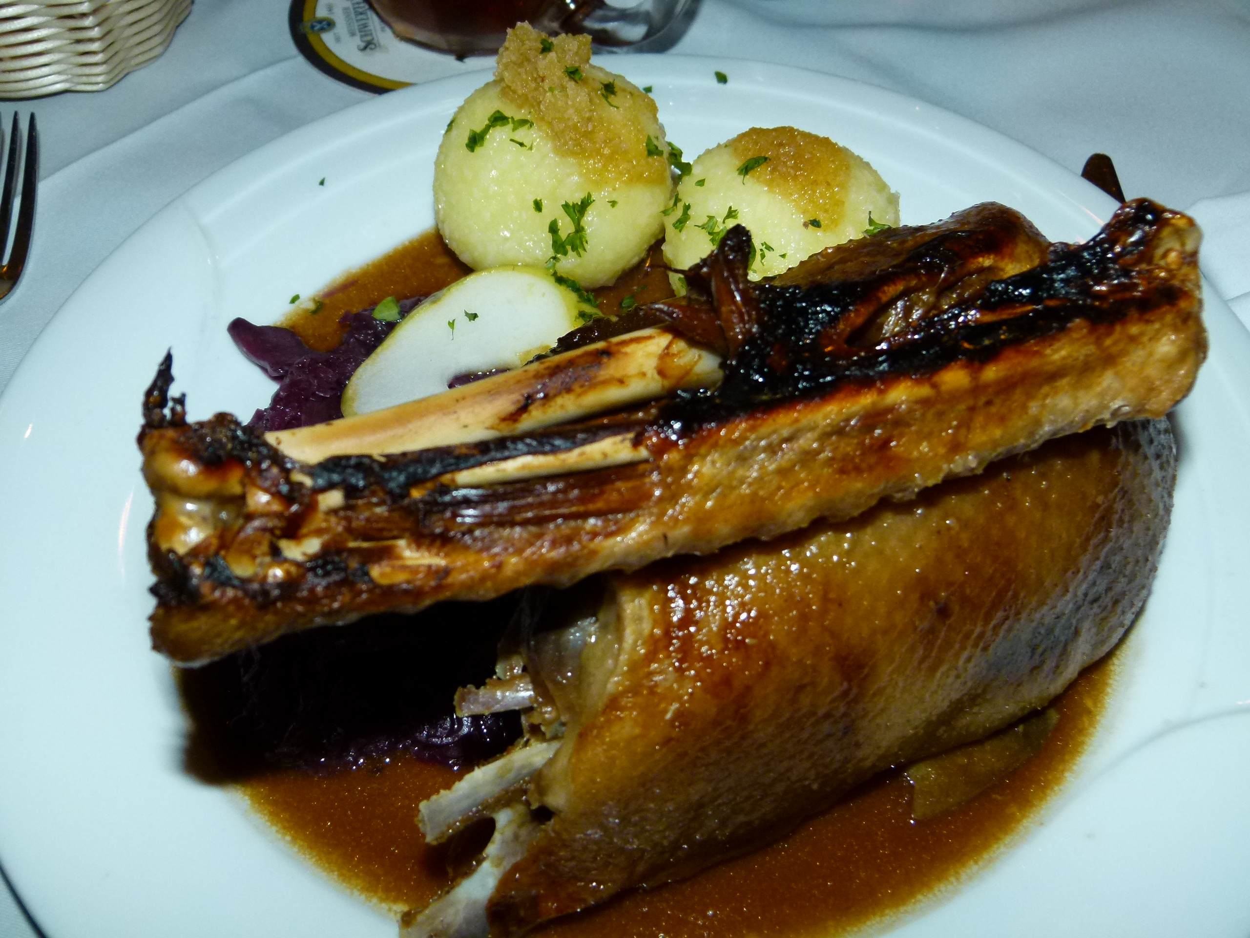 Martinsgans mit Apfelrotkohl und Thüringer Klößen, Restaurant Elbterrasse Wachwitz, Dresden